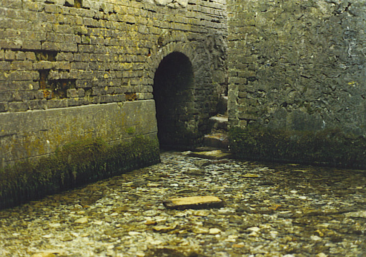 Беларуская (тарашкевіца): Выток ракі ў вёсцы Gouy.